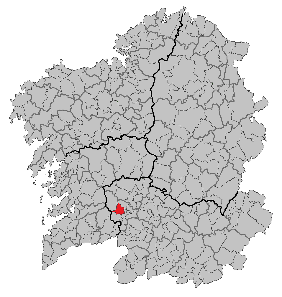 Mapa coa localización do concello de Carballeda de Avia.